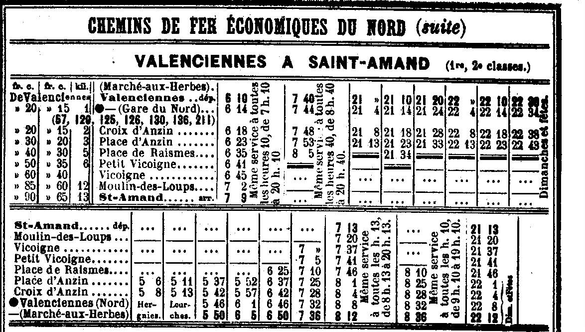 Livret horaire de la Compagnie des Chemins de fer économiques du Nord : réseau des tramways de ValenciennesLigne Valenciennes - Saint-Amand